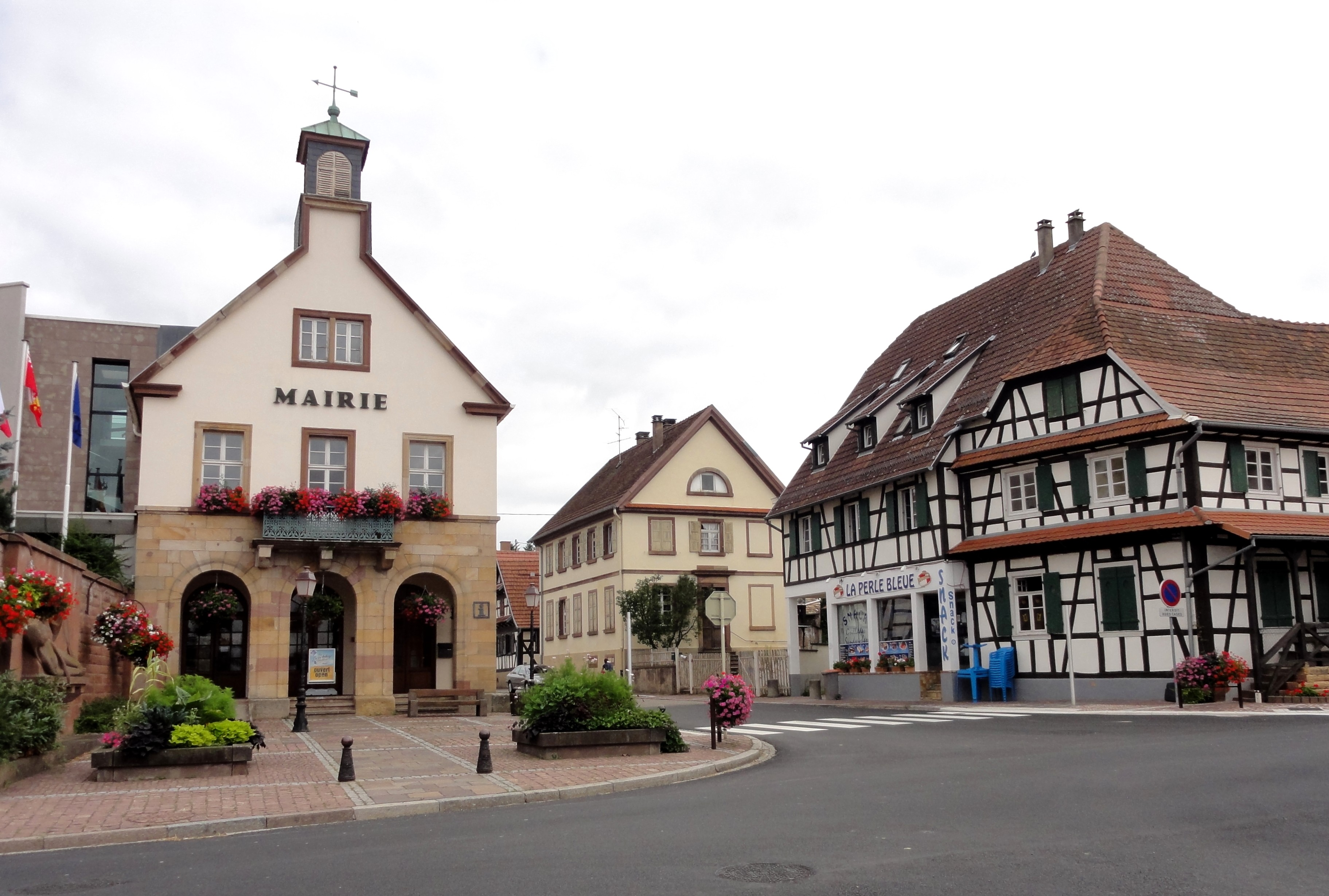 Alsace, Bas-Rhin, Betschdorf, Mairie (XIXe). .